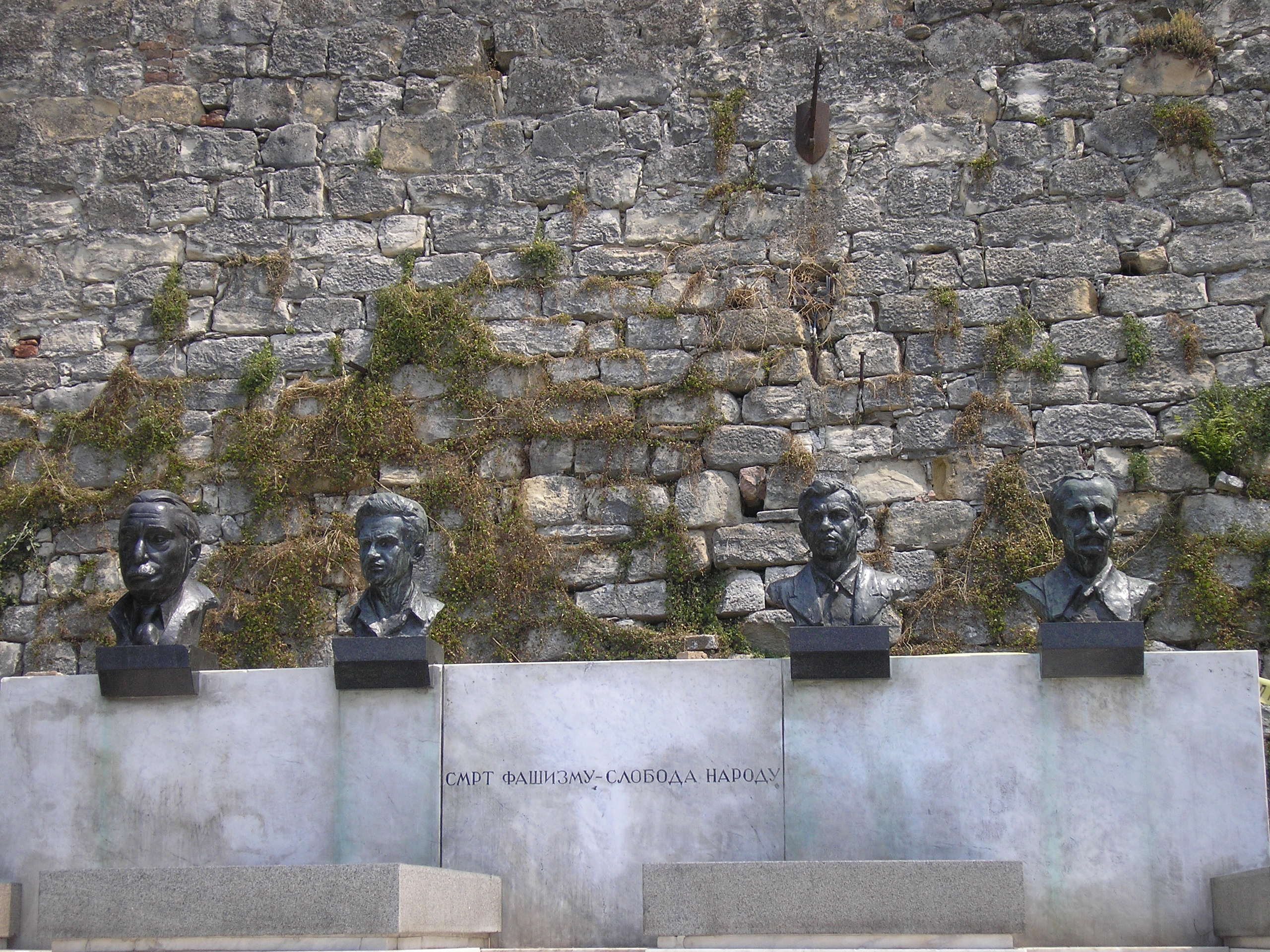 Гробница народних хероја на Калемегдану